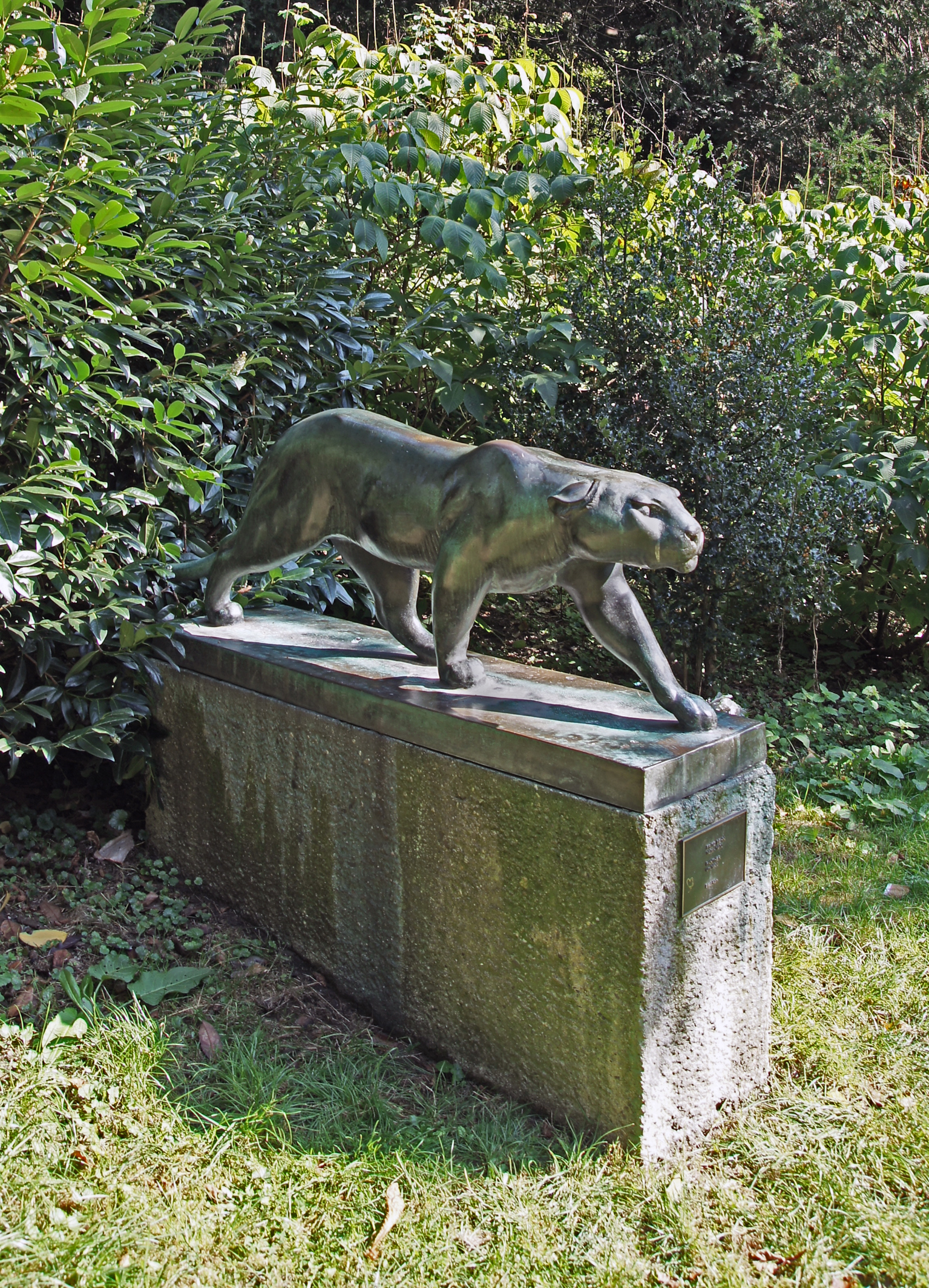 Bronze von F. Behn, ca. 1920, naturalistische Skulptur This is a photograph of an architectural monument., no. 0